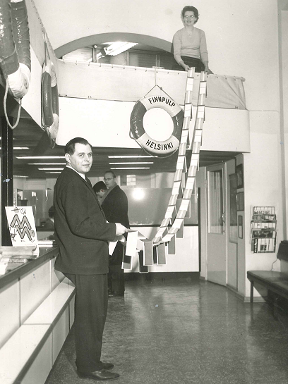 RTW lentolippu